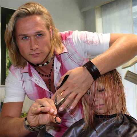 Nico Schwanz als Friseur